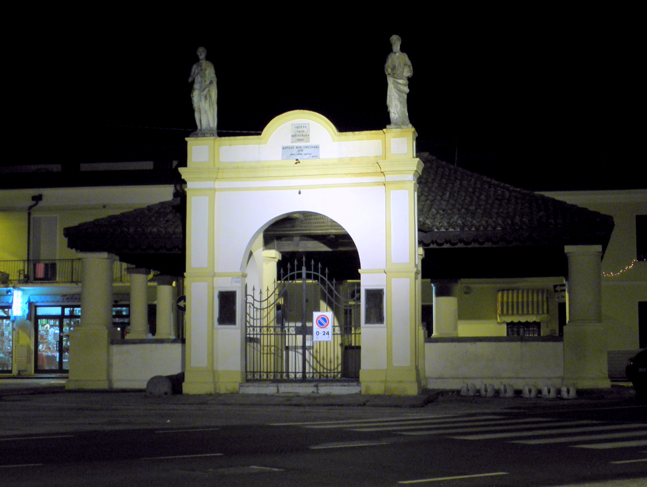 Il Pavajon ripreso di notte: Grignano Polesine, frazione di Rovigo.